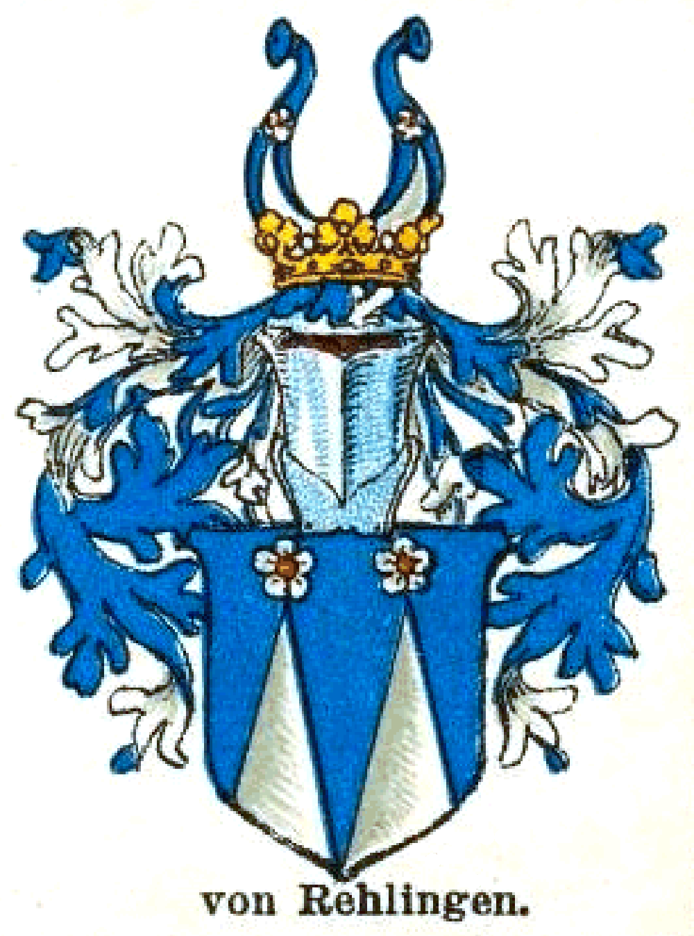 Wappen derer von Rehlingen